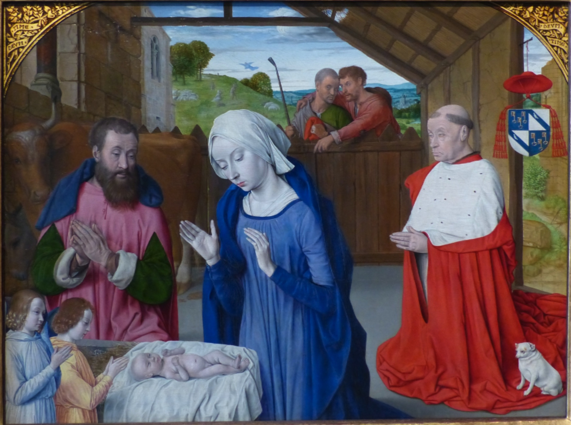 Nativité d'Autun (plein cadre sans amputation des bords)